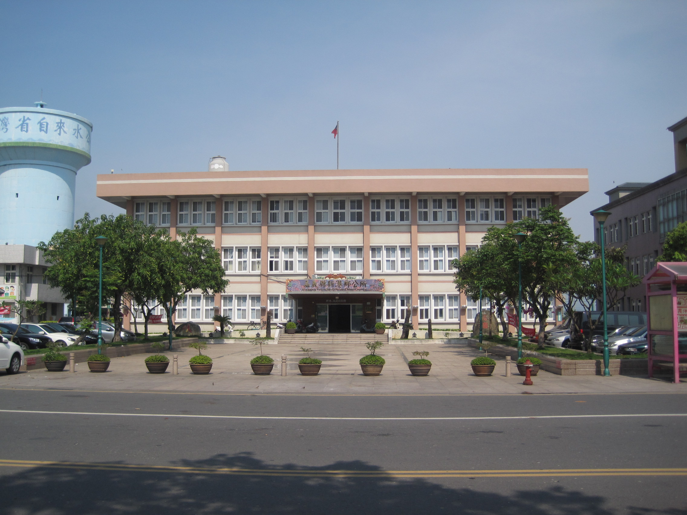 嘉義縣新港鄉公所，位於臺灣嘉義縣新港鄉中山路155號。